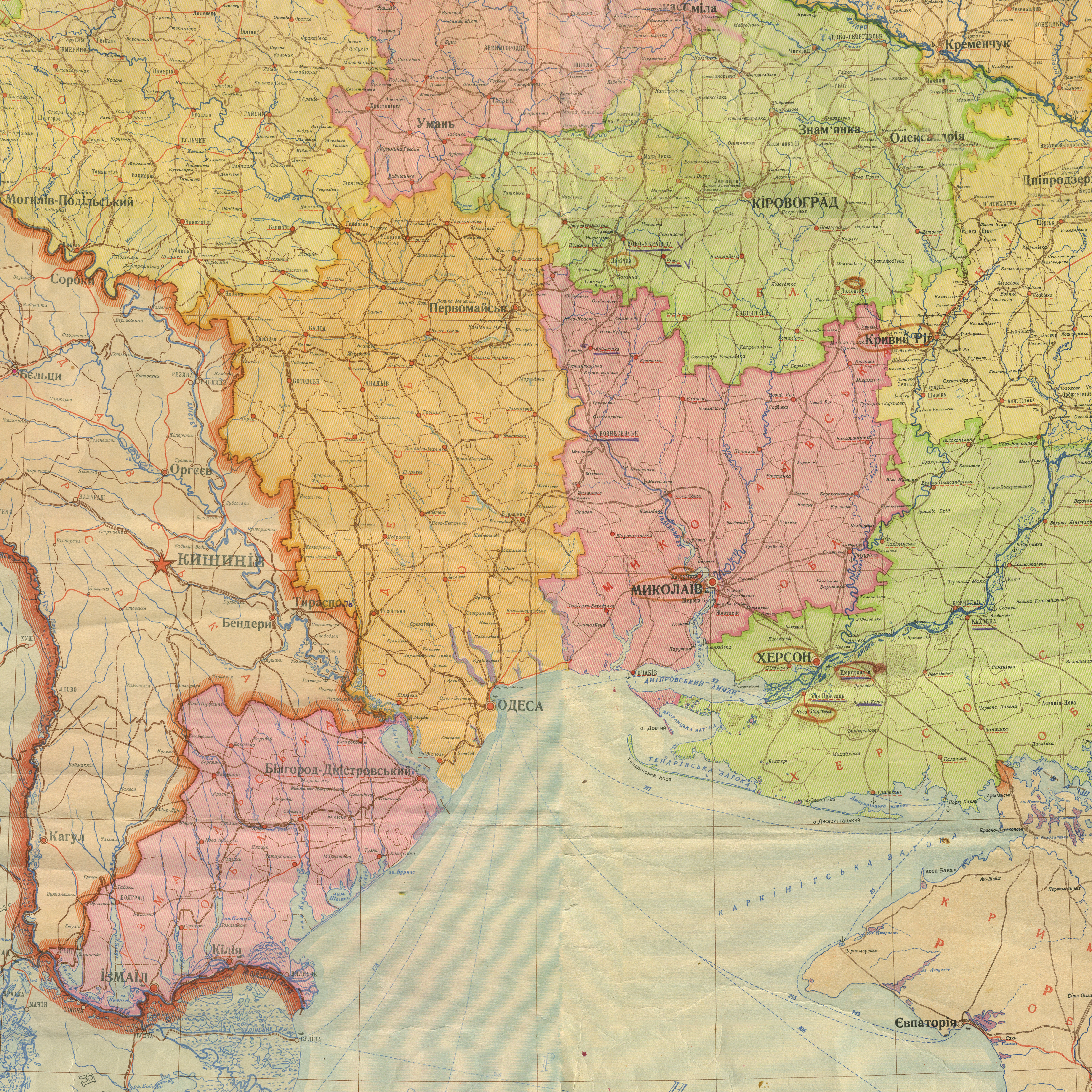 Територія Одеської, Миколаївської та Ізмаїльської областей, фрагмент карти Української РСР, адміністративний поділ від 1 листопада 1947